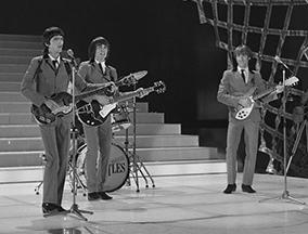 The Bootleg Beatles in het Nederlandse televisieprogramma Showbizzquiz in 1981